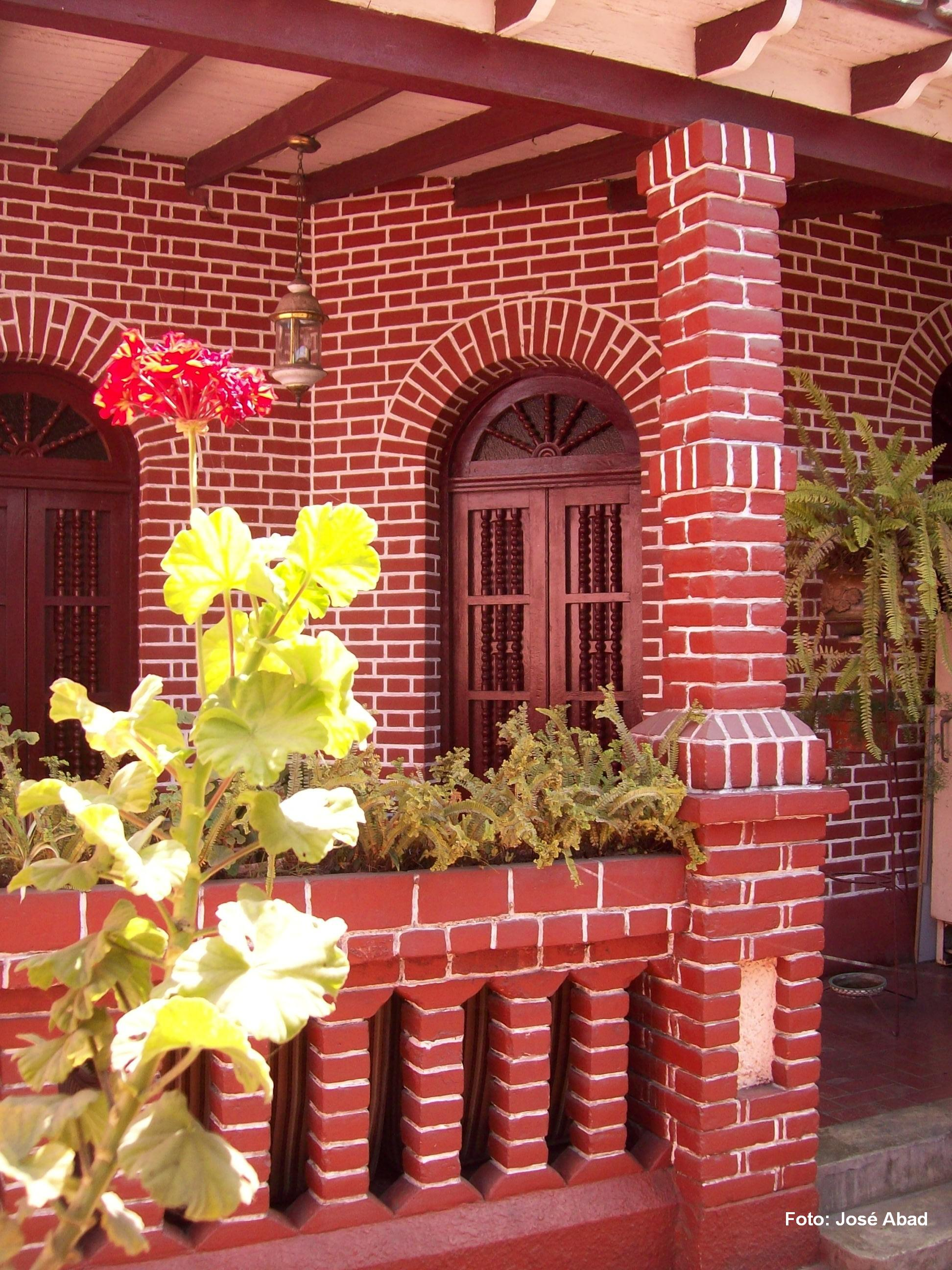 Una peculiar casa en donde predomina el color rojo, adornada con geranios. Situada en la cuadra 13 del Jirón Jorge Chávez en el distrito de Breña.